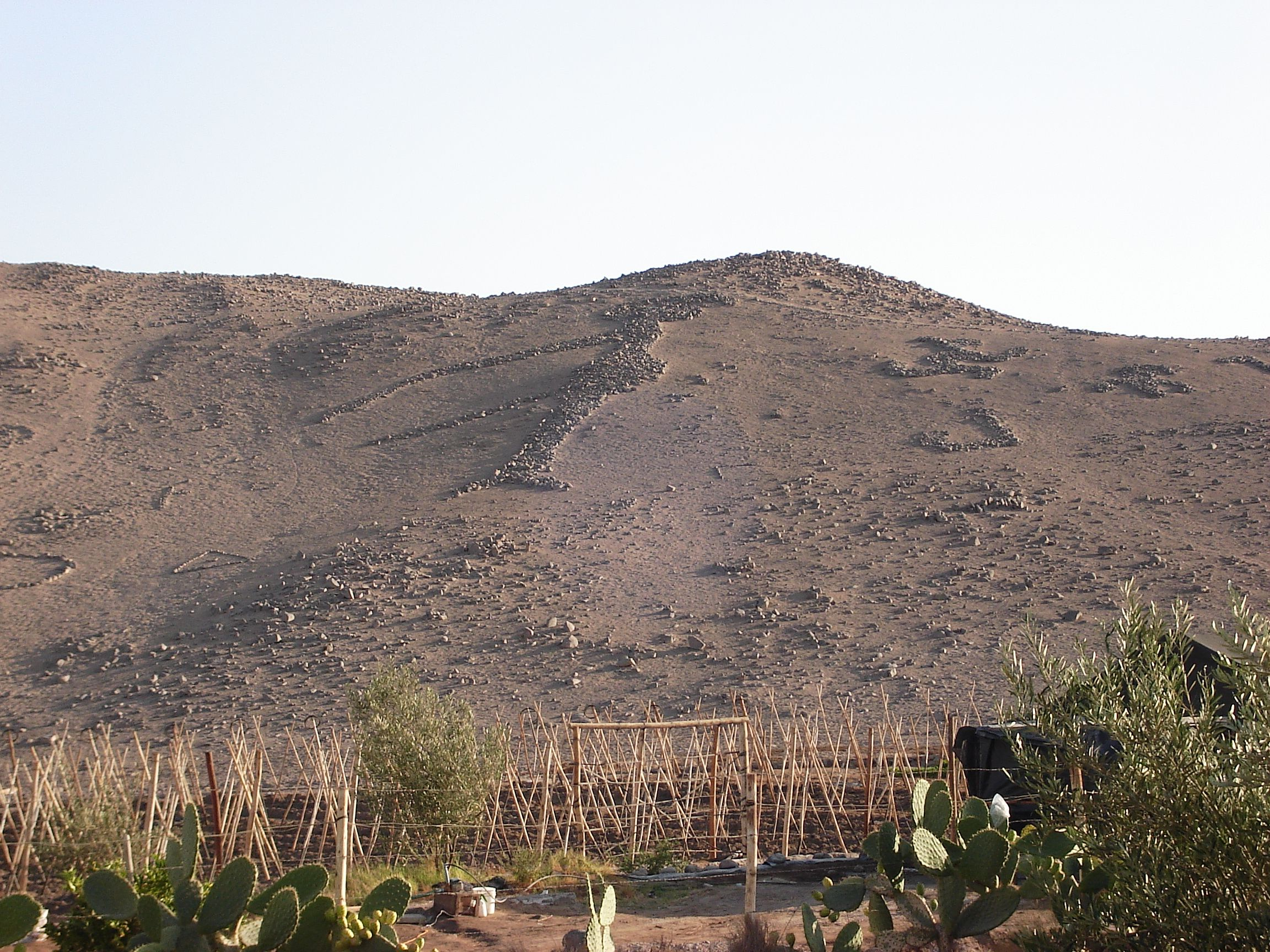 Foto tirada por mim, em Arica.